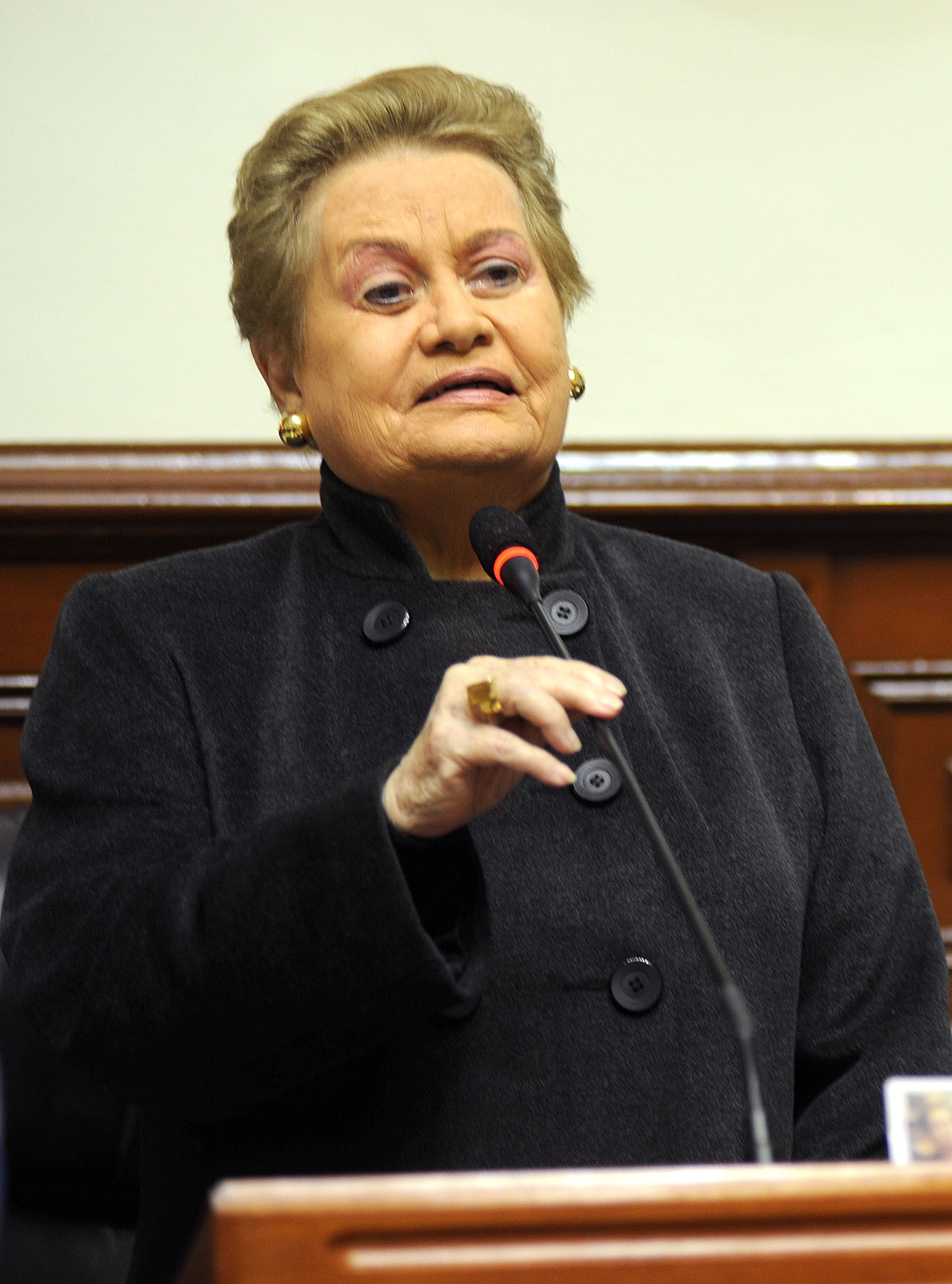 La congresista Martha Hildebrandt Pérez Treviño es recibida afectuosamente a su llegada al Palacio Legislativo, adonde se reintegró después de 60 días de ausencia a causa de una prescripción médica. Sus colegas le obsequiaron ramos de flores y le expresaron otras muestras de cariño.